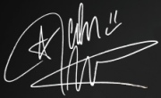 jepic